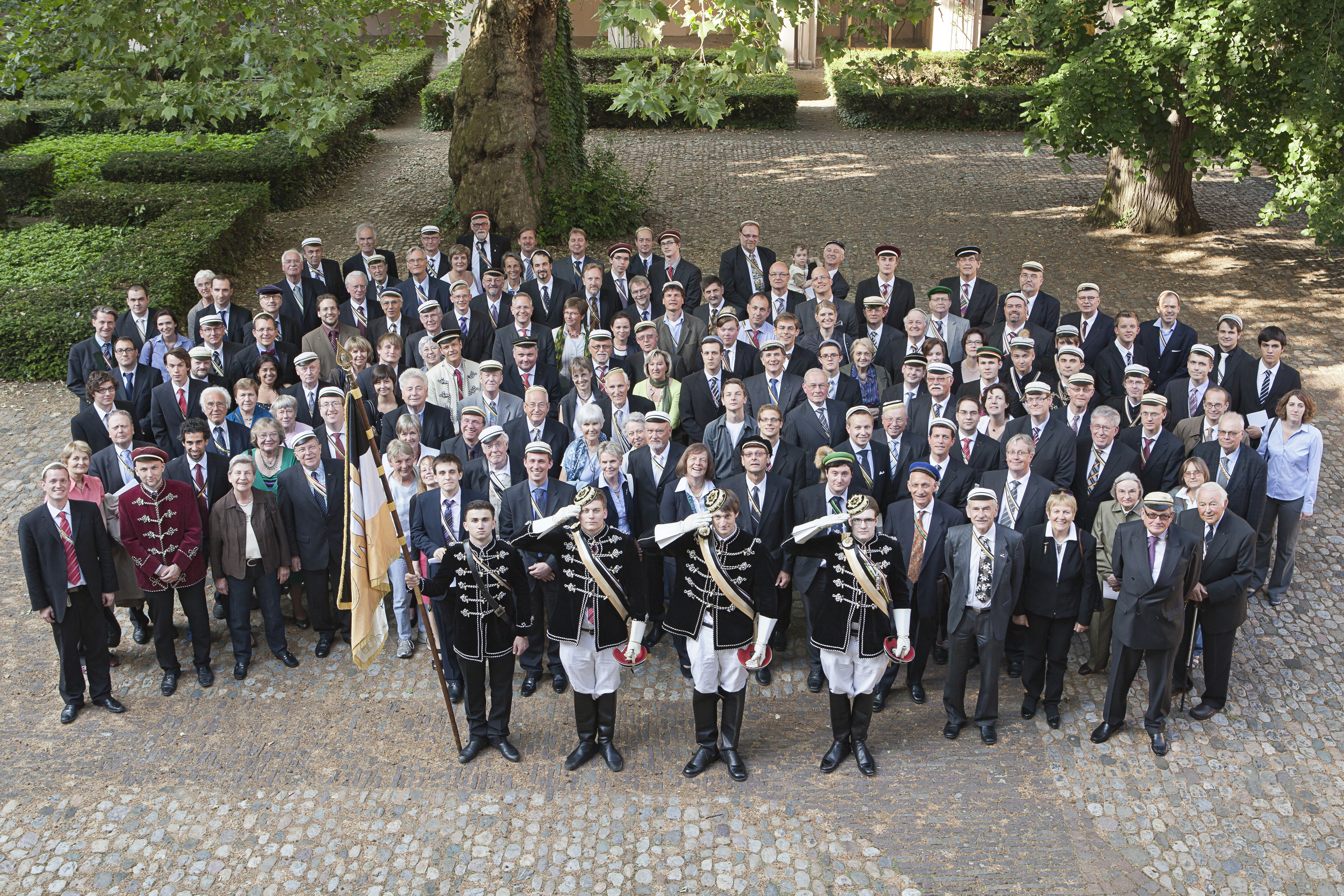 Festteilnehmer des 100. Stiftungsfestes des Freiburger Wingolf